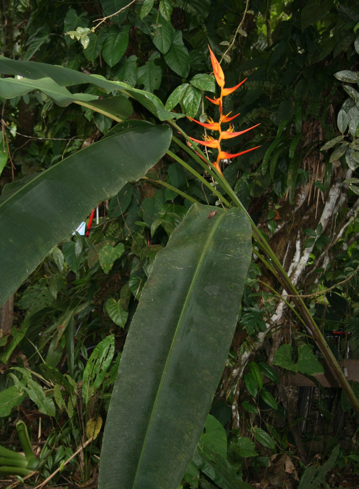 Heliconia latispatha, Heliconiaceae - Costa Rica: Prov. Puntarenas, La Gamba NW Golfito, "Tropenstation La Gamba"/"Estación Biológica La Gamba"